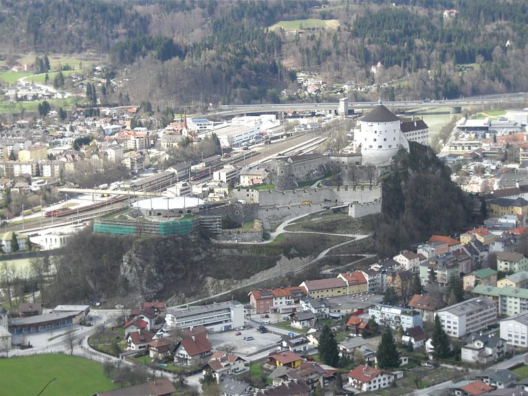 Festung Kufstein (mit neuer mobilen Überdachung)